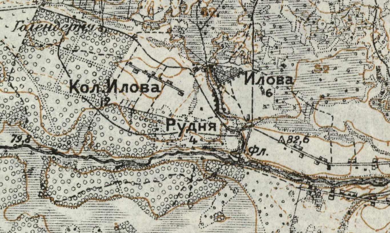 Iłowa, Iłowa Kolonia i Rudnia na rosyjskiej mapie topograficznej z lat ok. 1914-1917